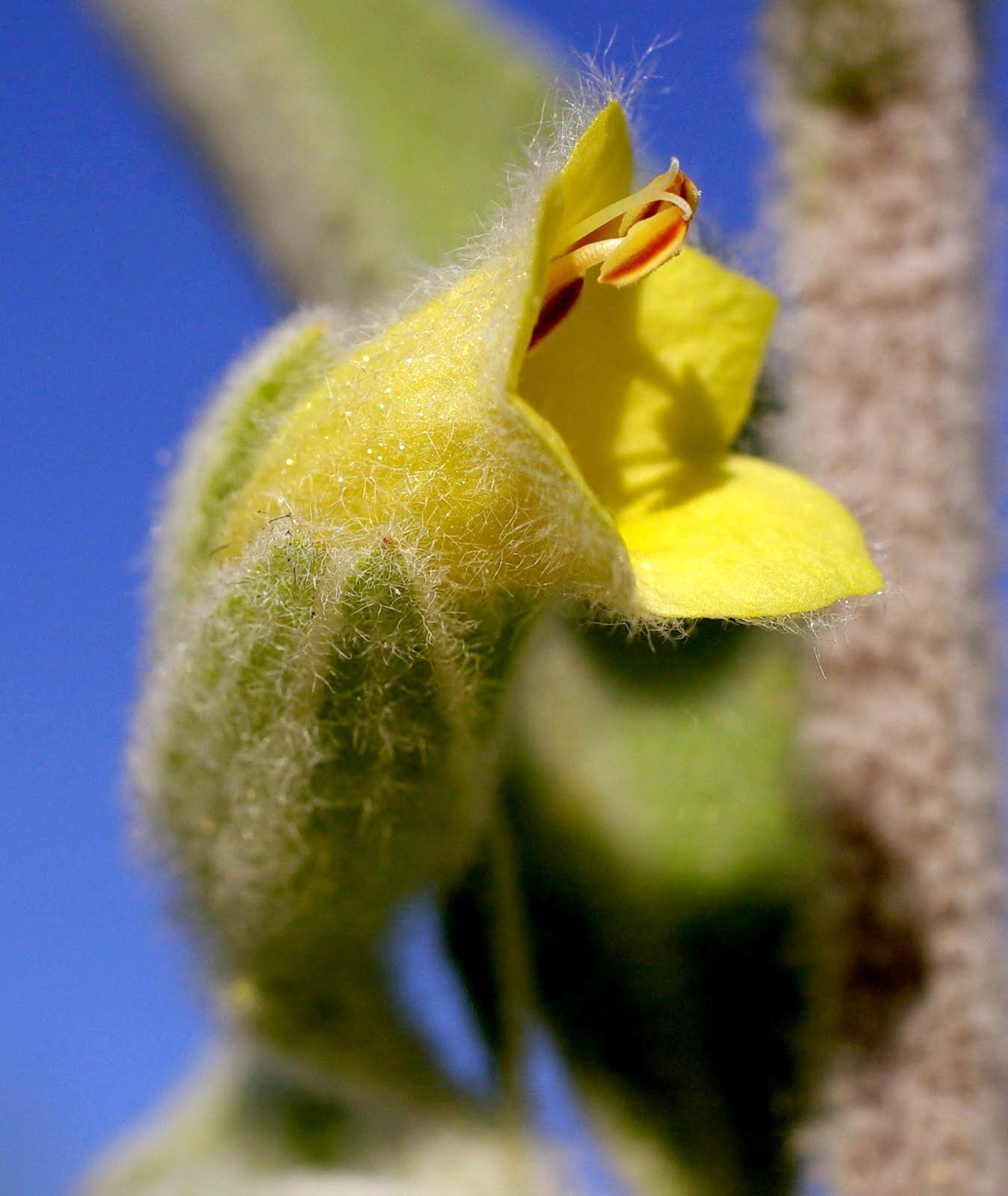 Muniria quadrangulata - ex Pityrodia quadrangulata